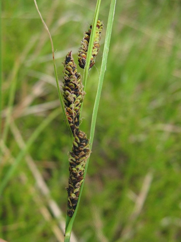 Braun-Segge Carex nigra, Zingst